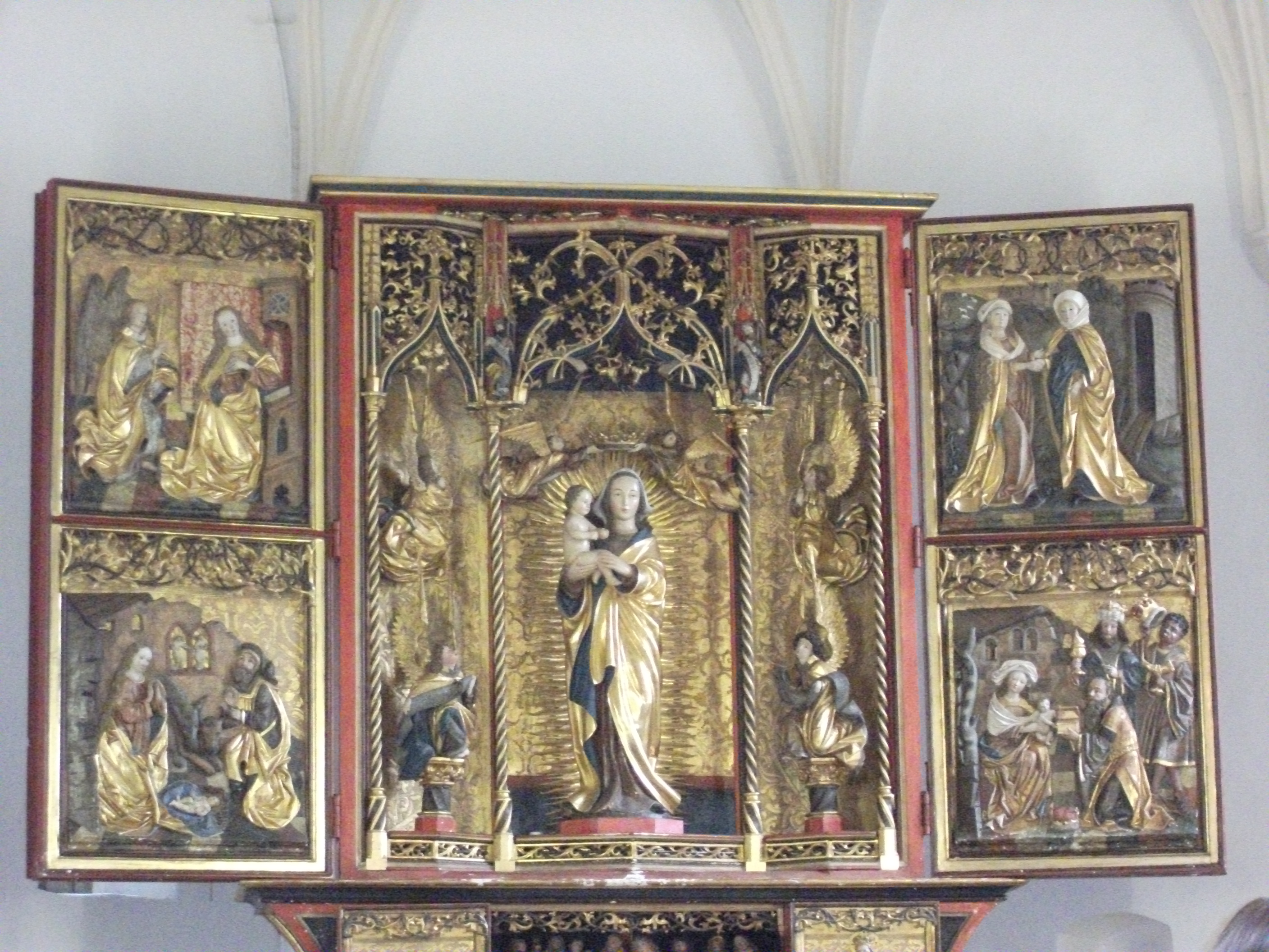 Altar von 1492, geöffnet